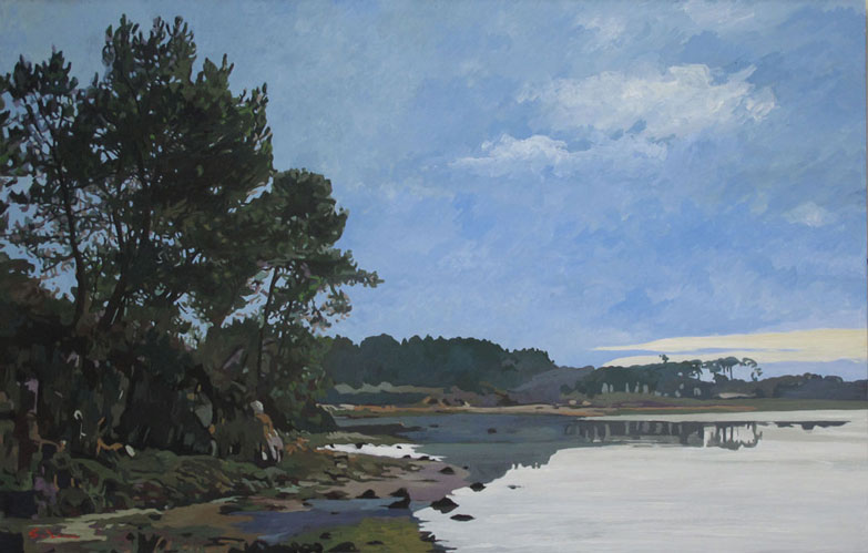 Pouldon